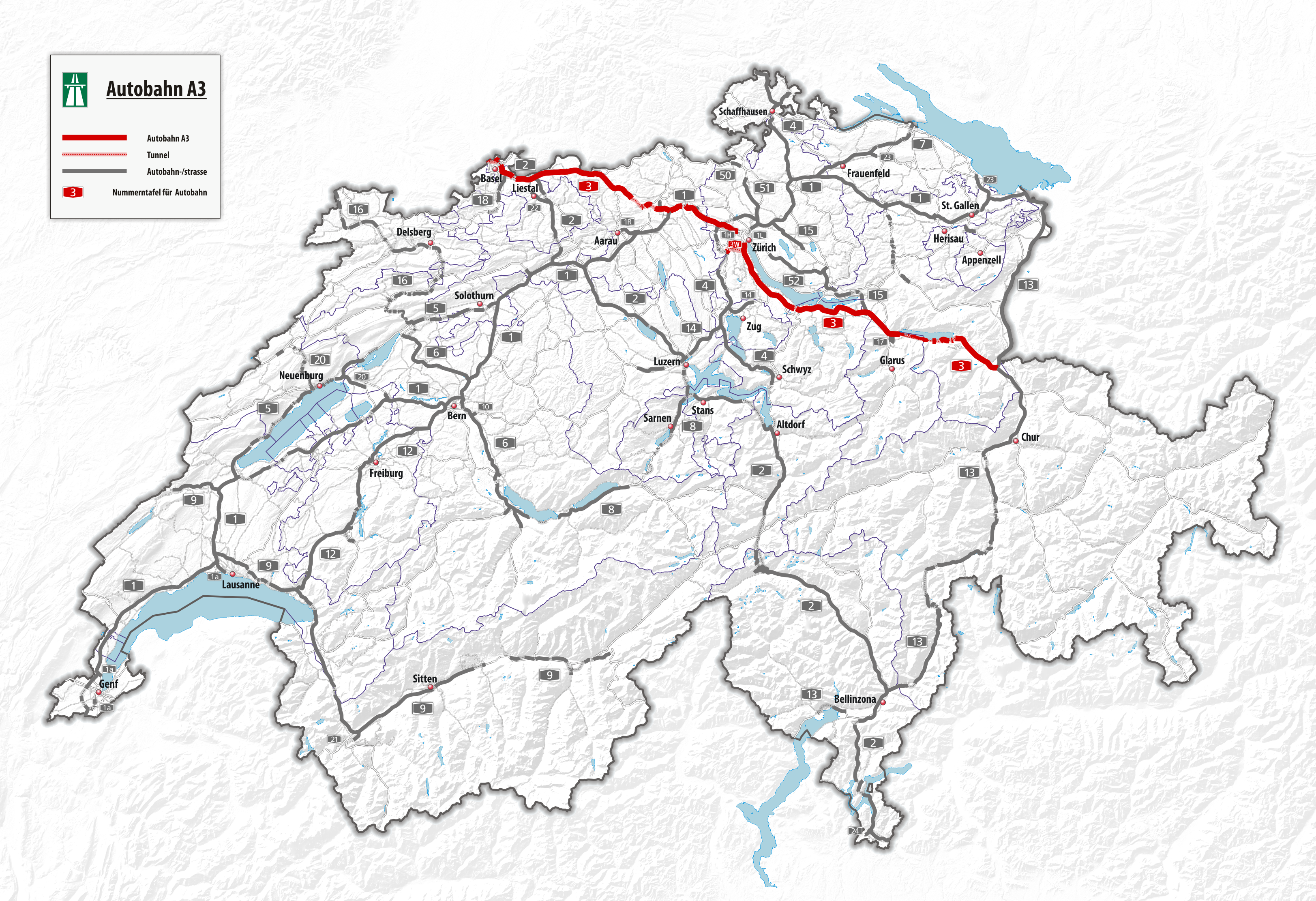 Autobahn A3 Stand 2018